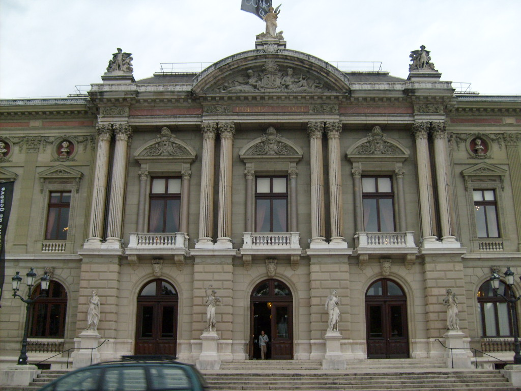 Façade du Grand Théâtre de Genève depuis la place Neuve